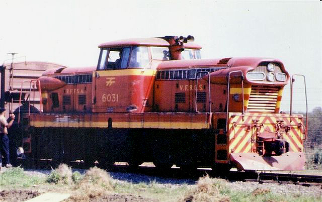 Locomotiva GMDH-1 General Motors Diesel Hidráulica nº 6031 VFRGS